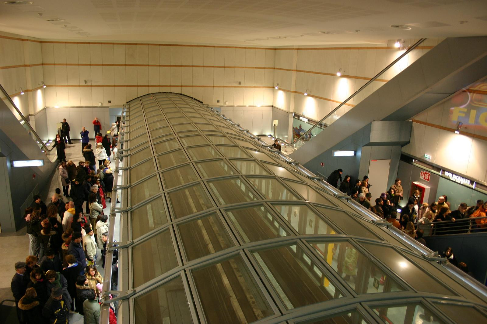 Stazione di XVIII Dicembre della metropolitana di Torino.